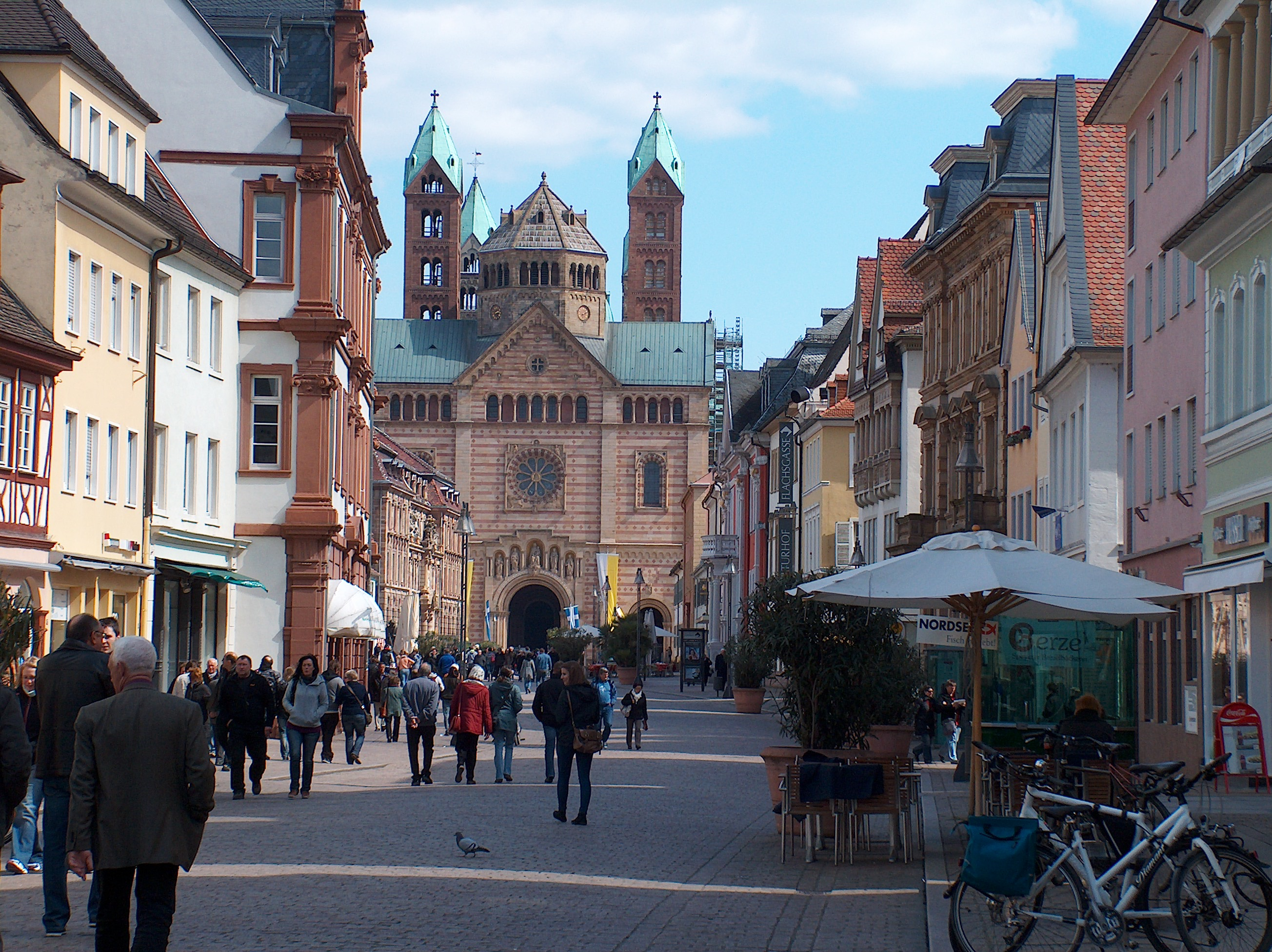 Fußgängerzone in Speyer